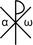 Chrisme, accompagné d'un alpha et d'un omega, sans labarum ni couronne Il s'agit d'un dessin personnel (ça se voit, mais je précise quand même). Il est tombé dans le domaine public aujourd'hui archeos 29 mar 2004 à 00:13 (CEST)